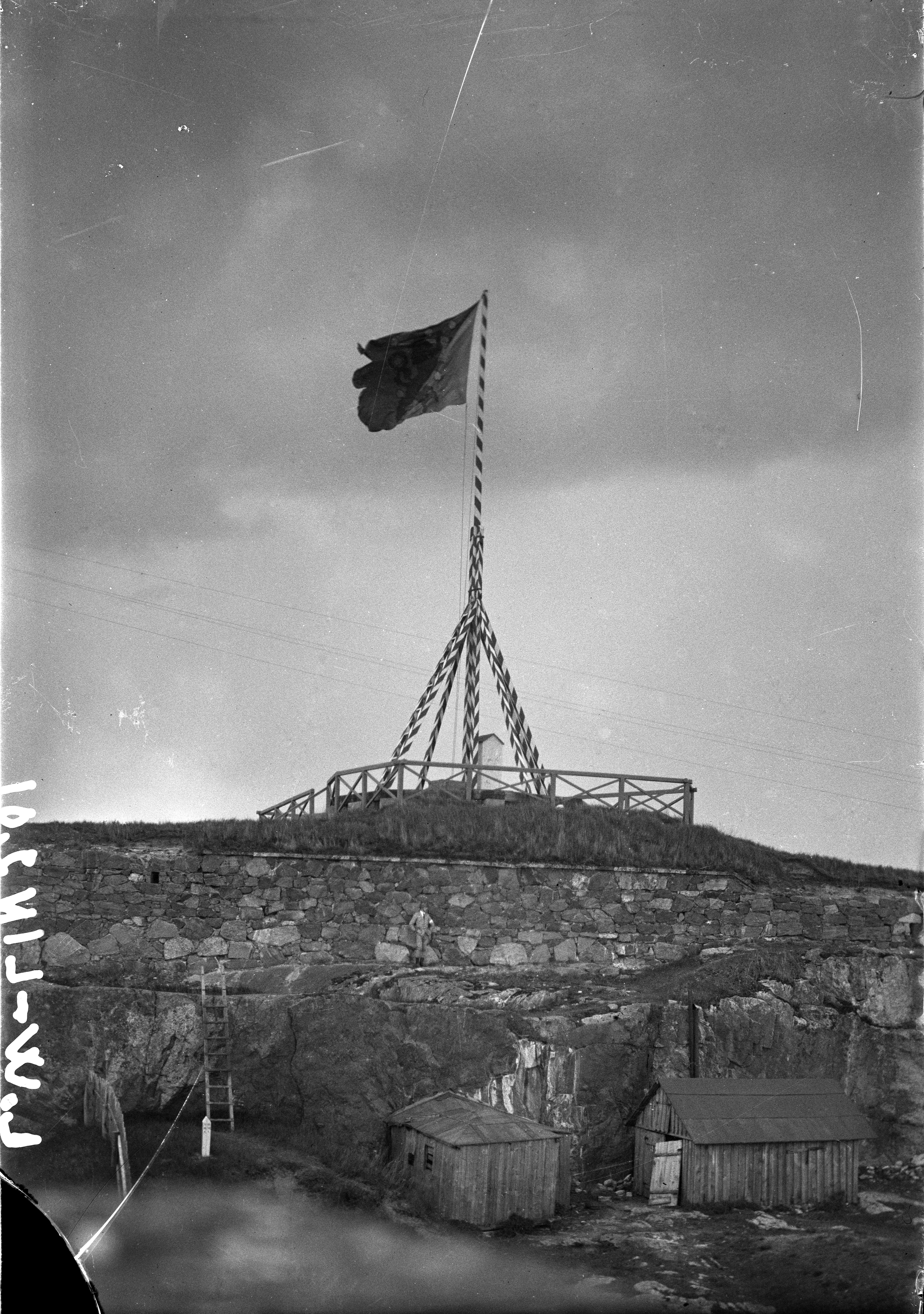 Suomenlinnan salkoon nostettu punainen leijonalippu huhtikuussa 1918 merkiksi linnoituksen valtaamisesta.